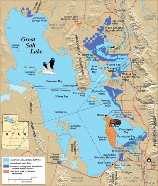 Mapa Gran Lago Salado